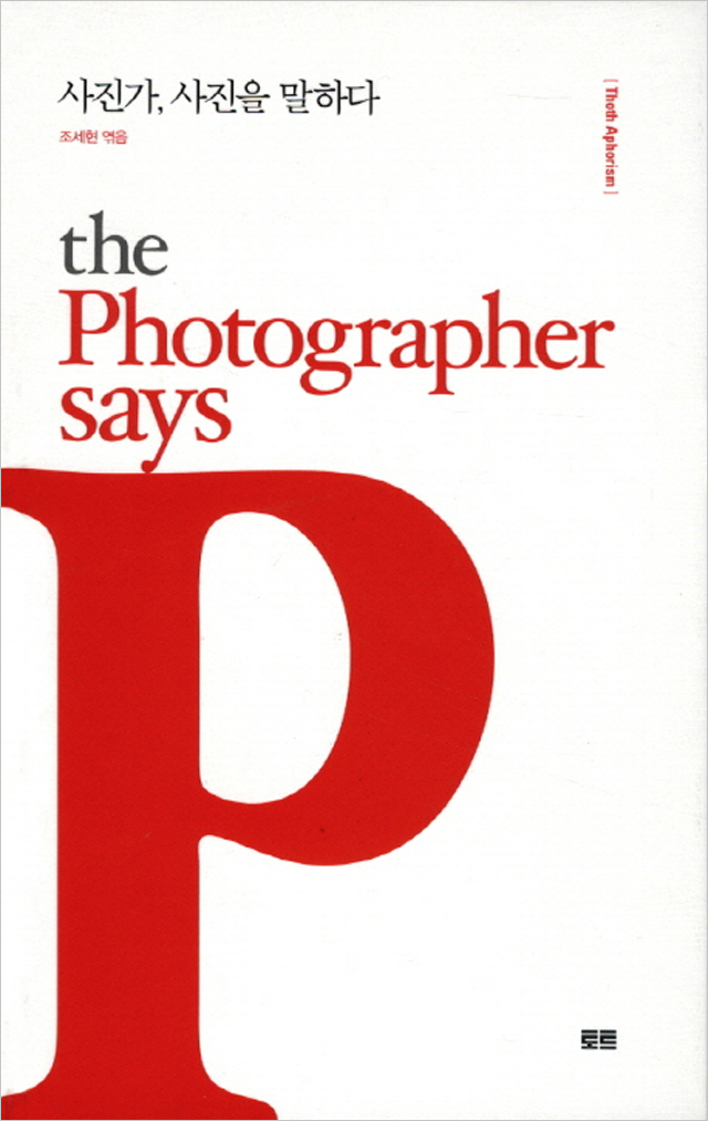 조세현 저서 Seihon Book